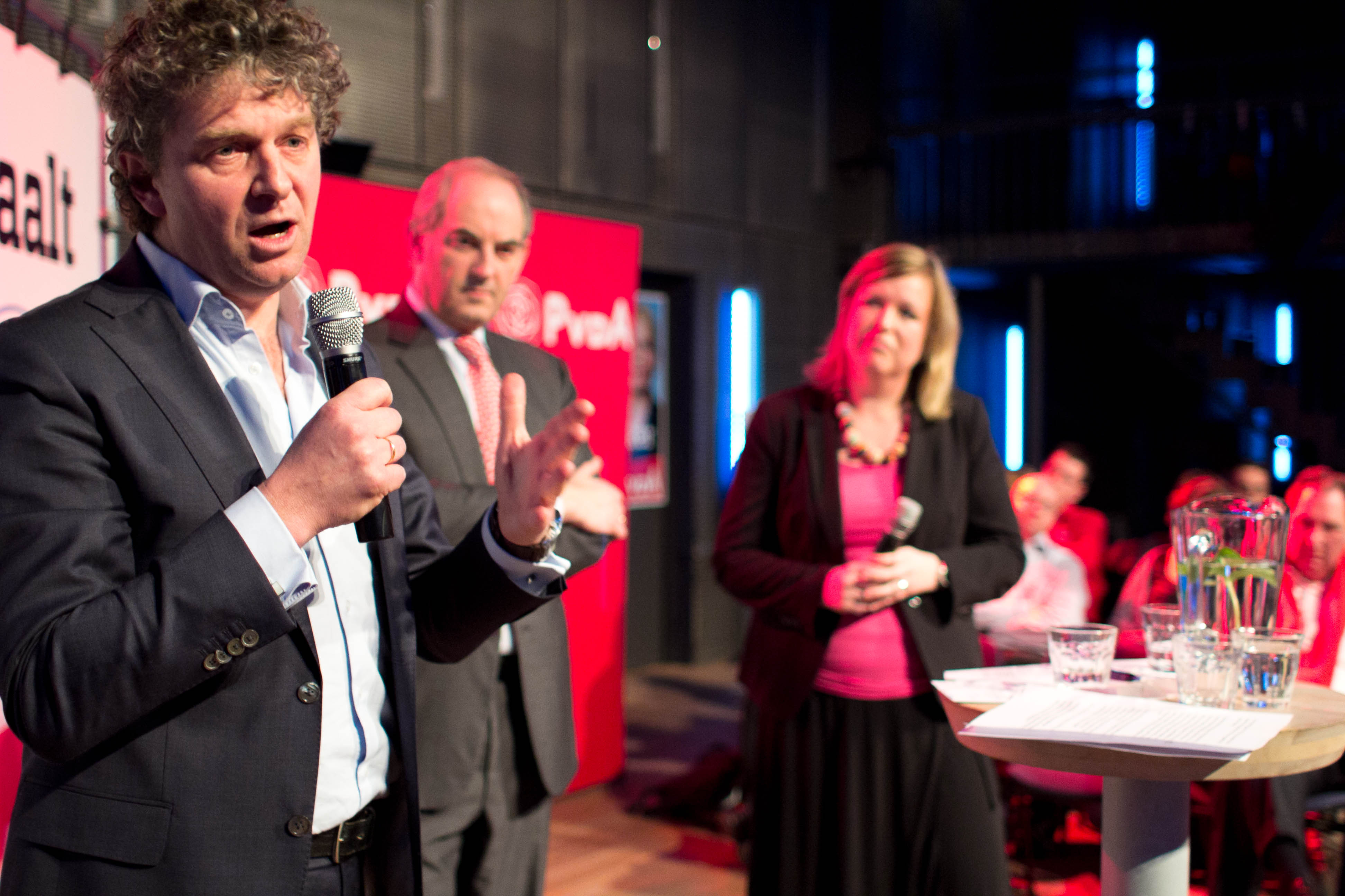 Townhall Amsterdam